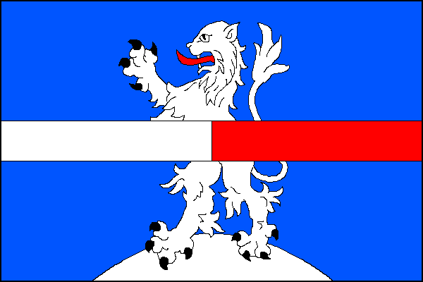 Zavidov - vlajka